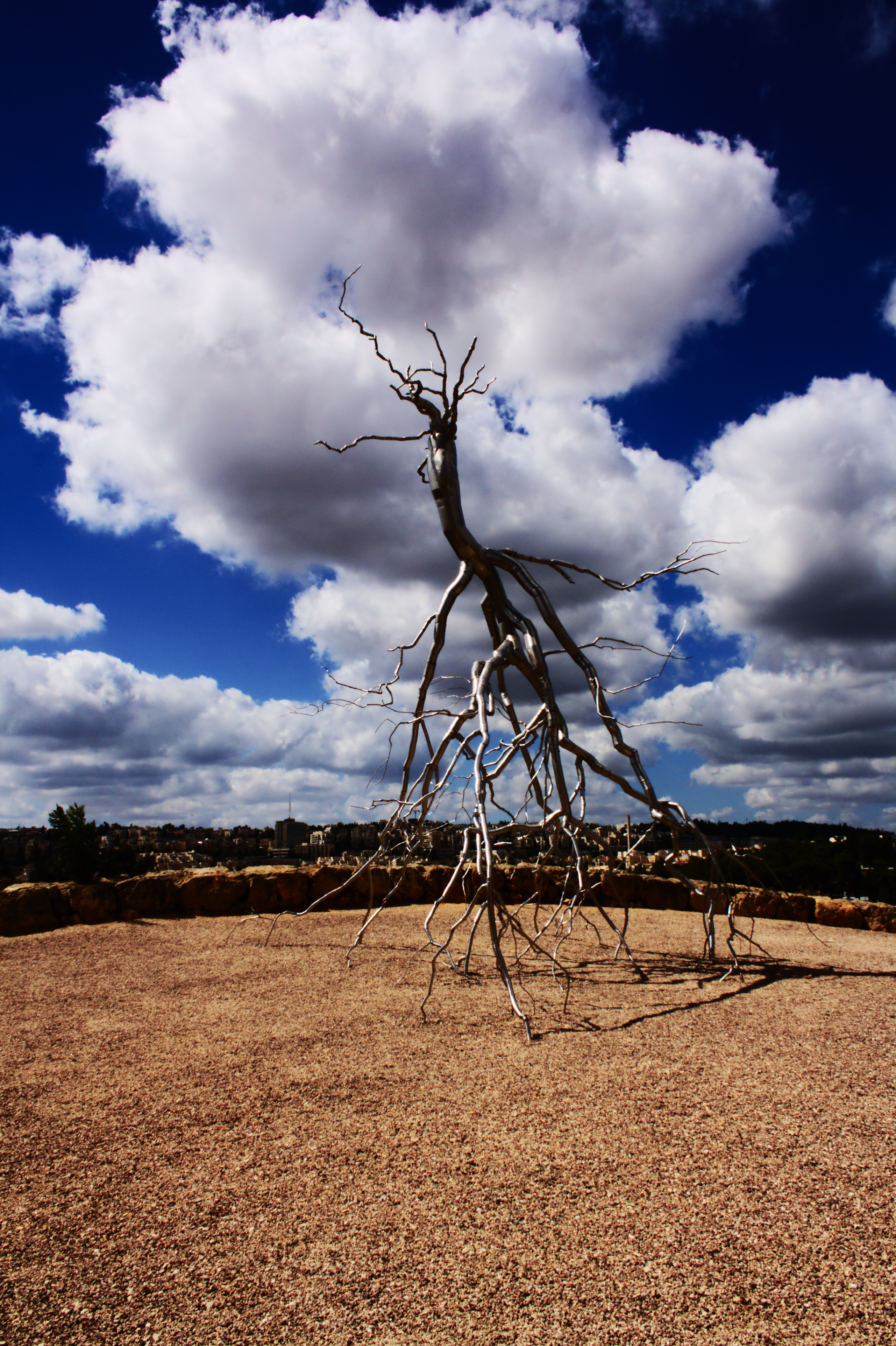 תיאור מהאתר של האמן